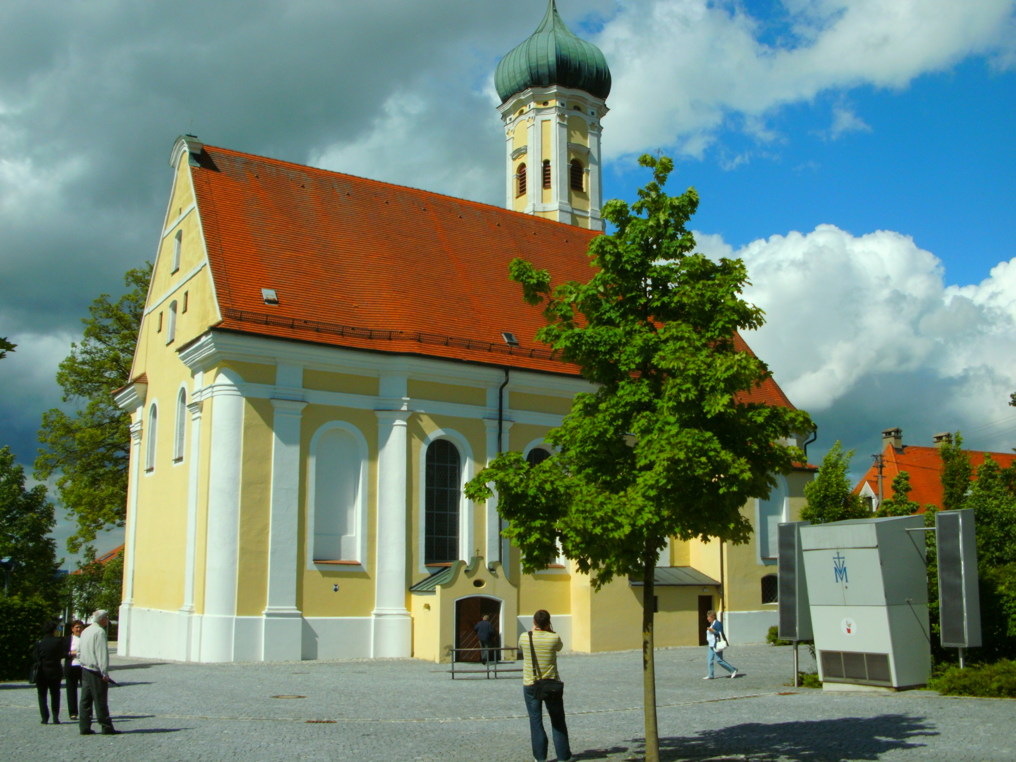 Wallfahrtskirche Maria Vesperbild